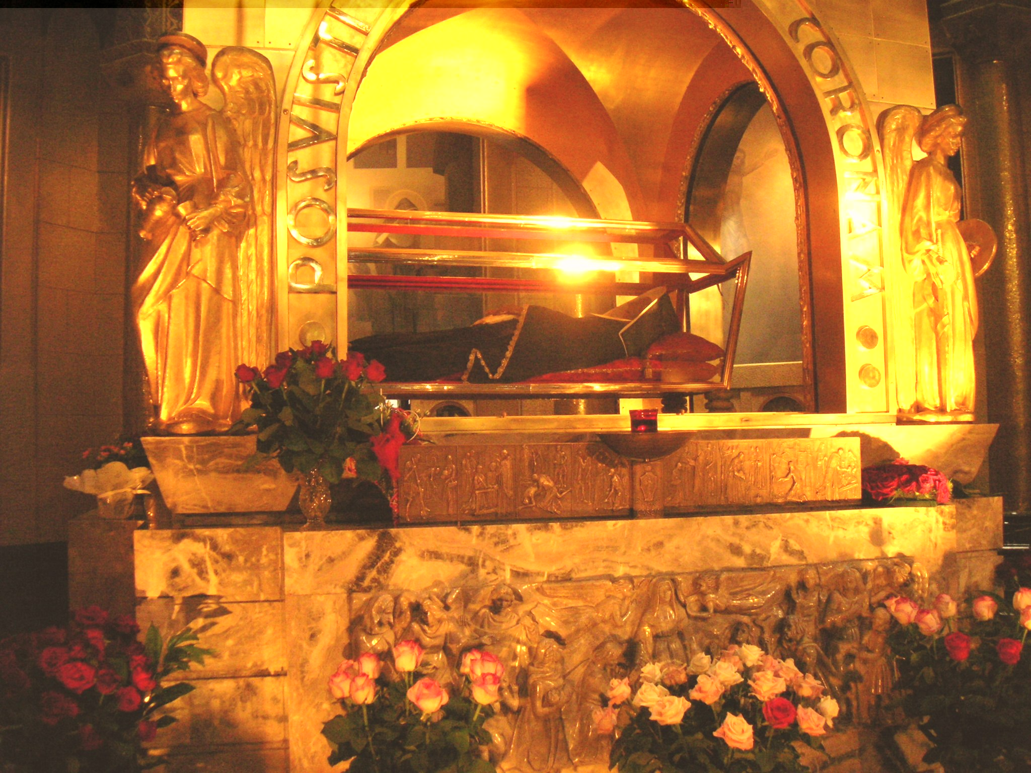 La basilica di Santa Rita a Cascia